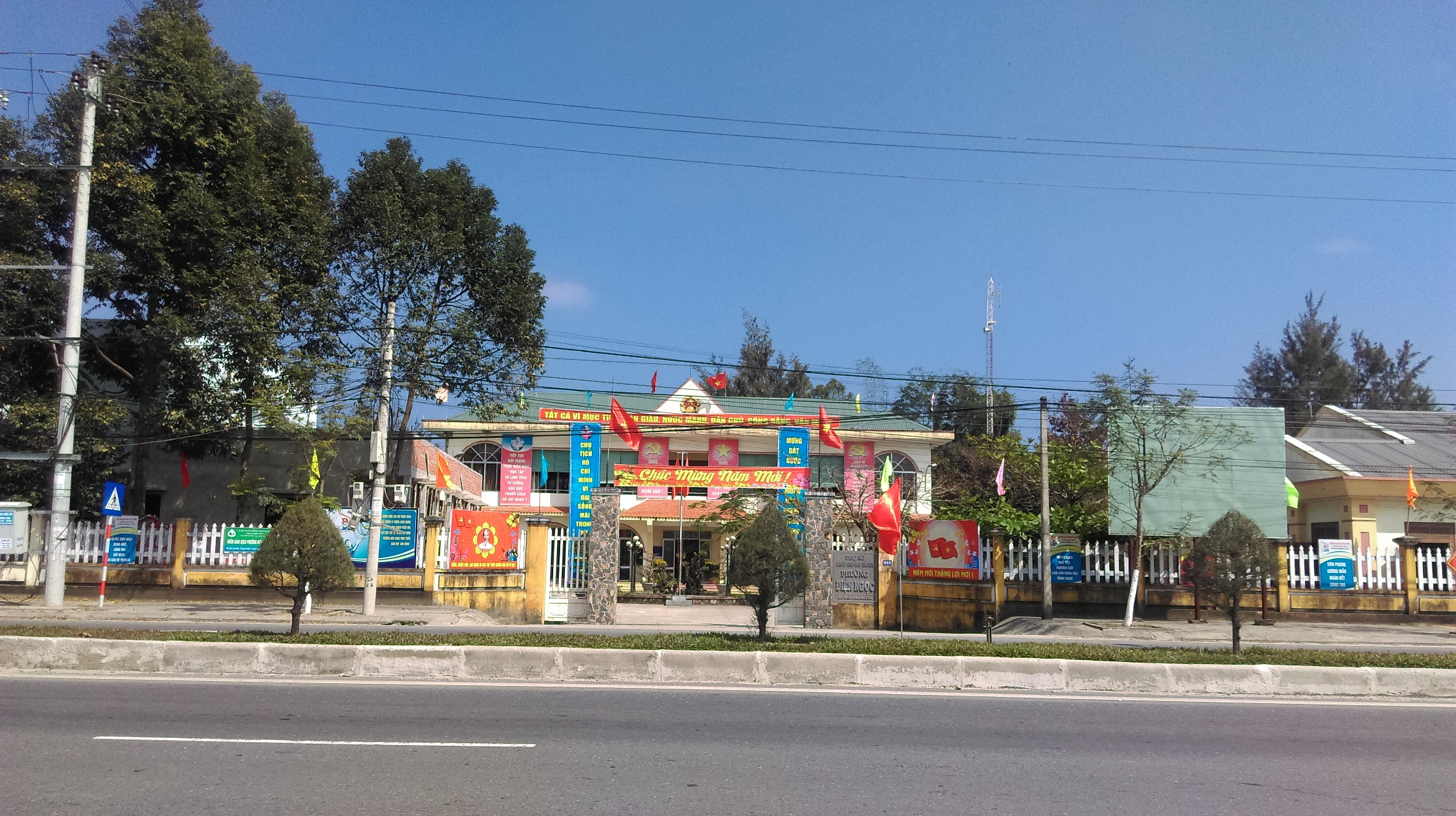 UBND phường Điện Ngọc, Điện Bàn, Quảng Nam